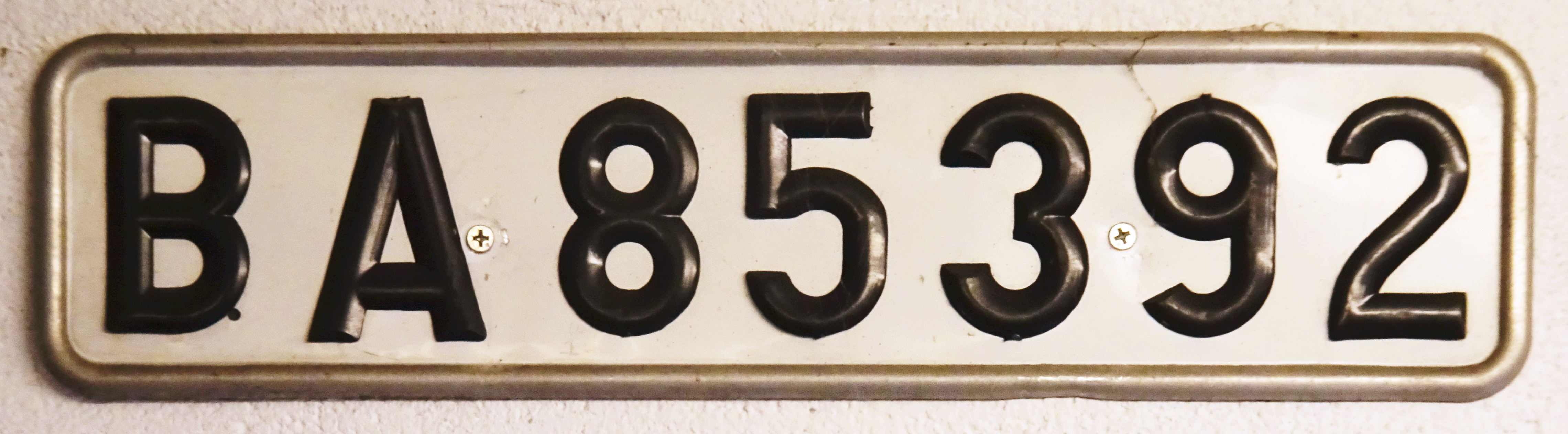 Svensk registreringsskylt BA 85392